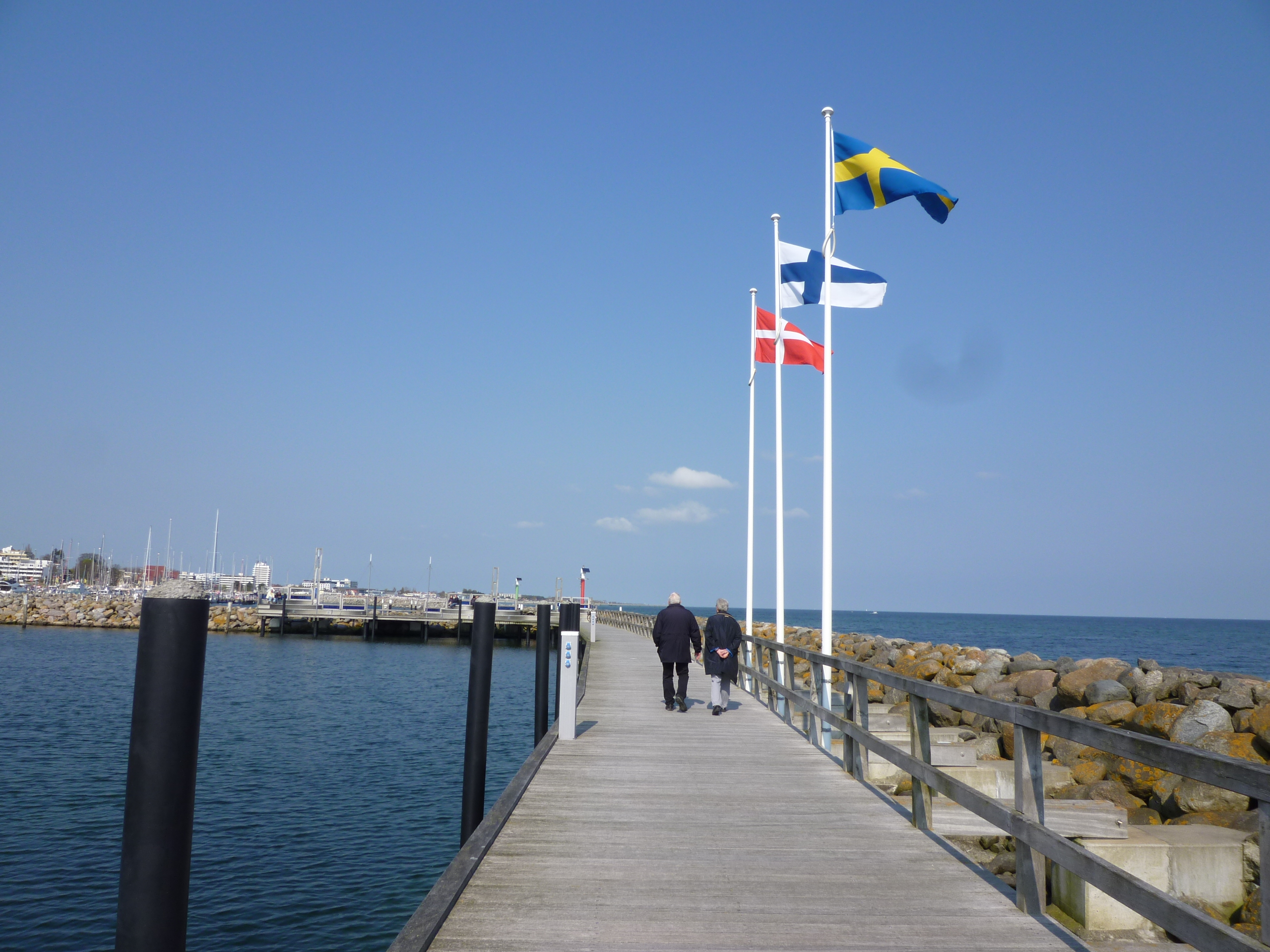 Mole am Yachthafen in Grömitz, Ostholstein.